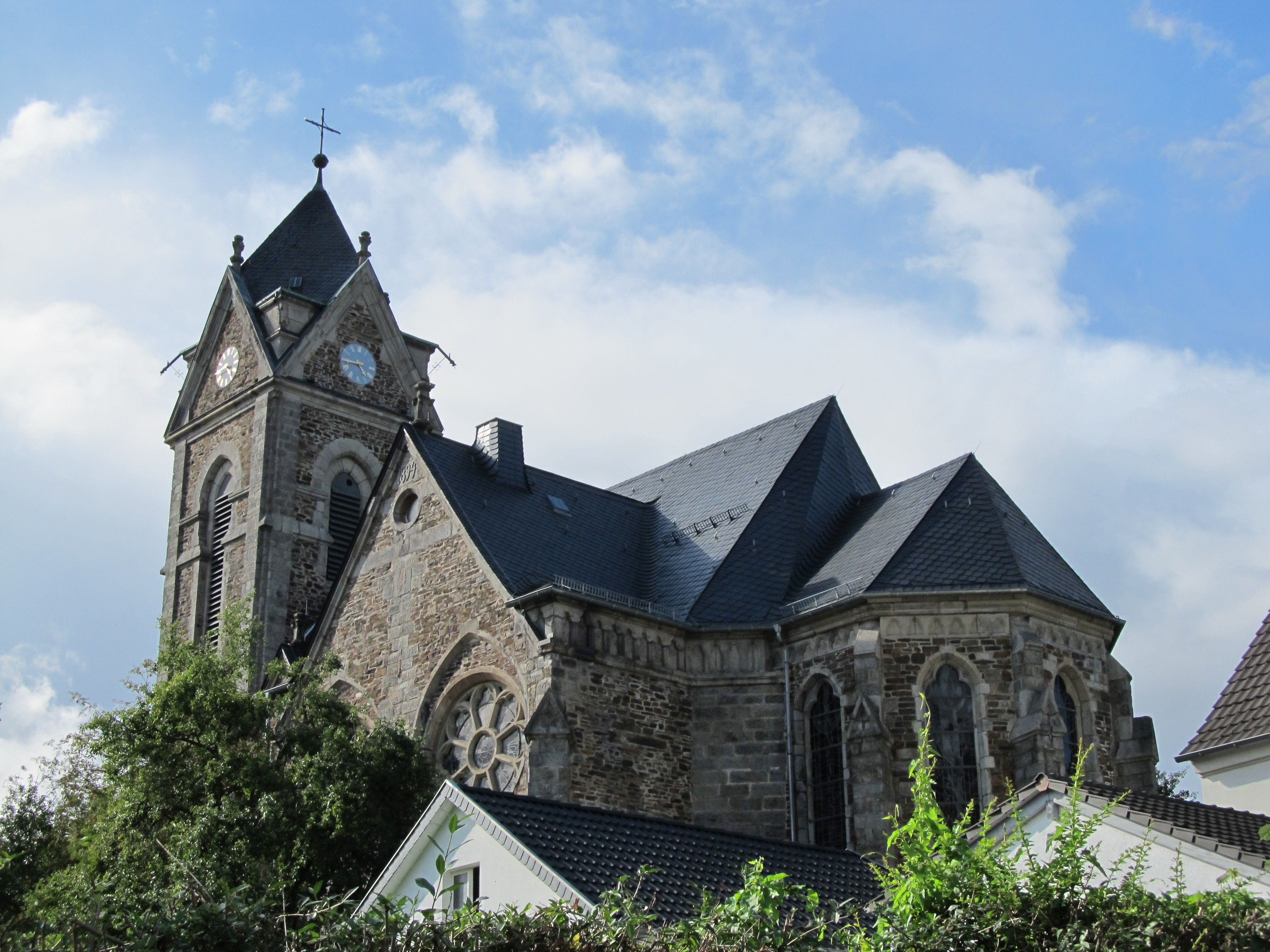 Die Kreuzkirche in Betzdorf, Sieg (Rheinland-Pfalz).